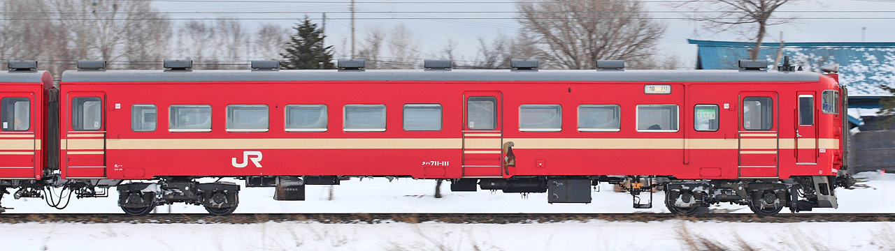 JR Hokkaido's type Kuha 711-100 ( Minenobu Stn. - Koushunai Stn. )